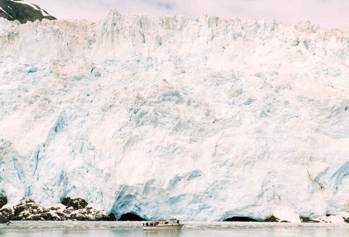 קרחון באלסקה